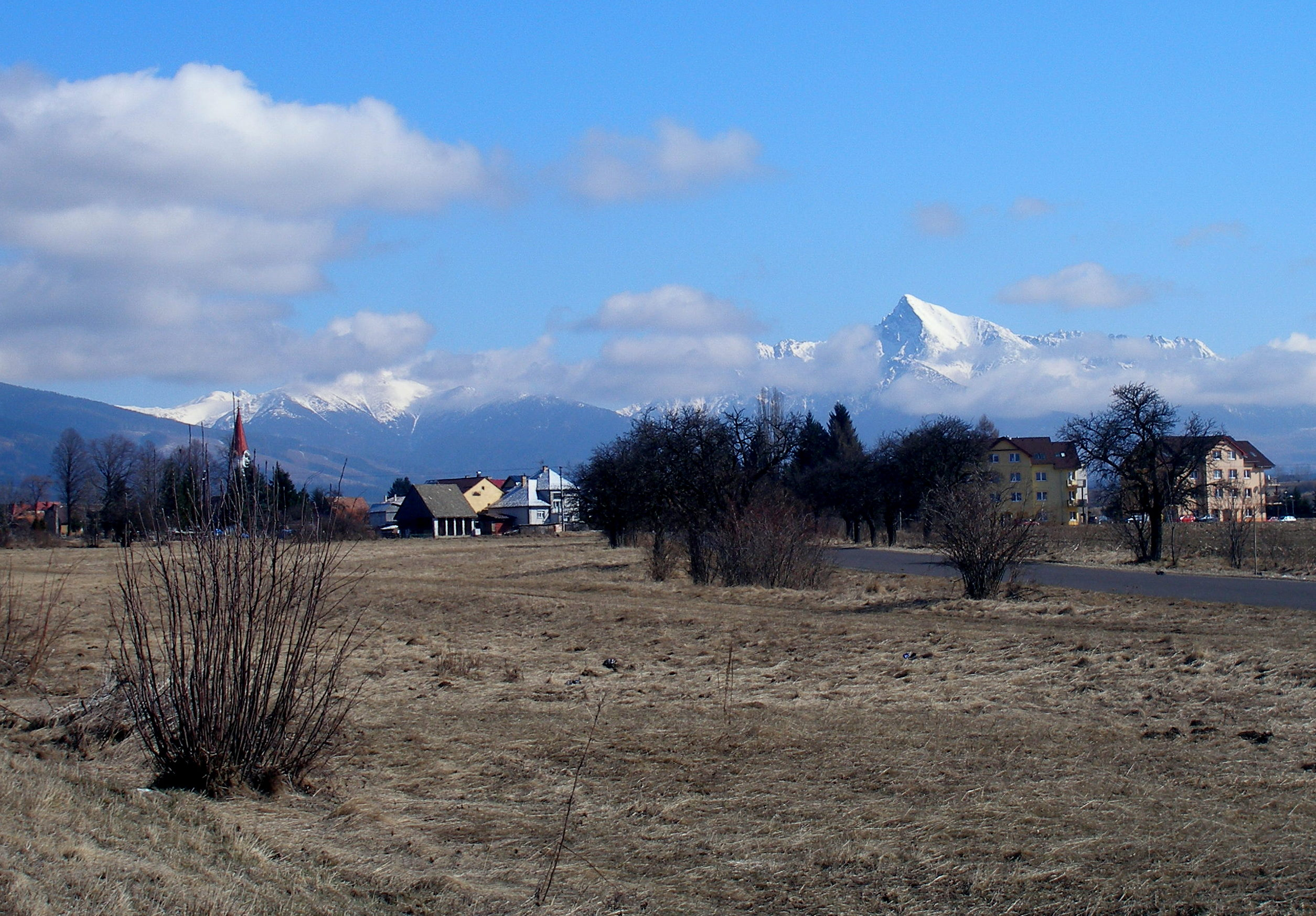 Pohľad na tatranský štít Kriváň. Slovensko Vysoké Tatry.